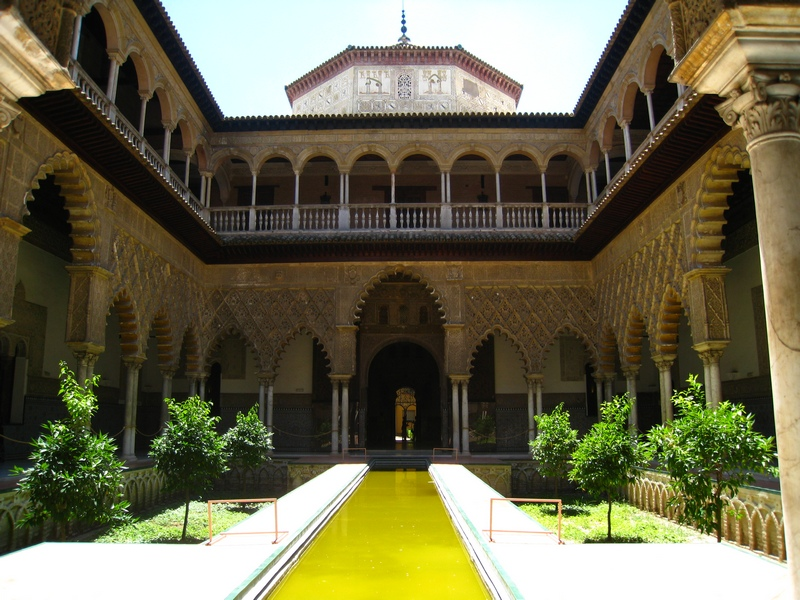 Real Alcazares, Sevilla, Spain